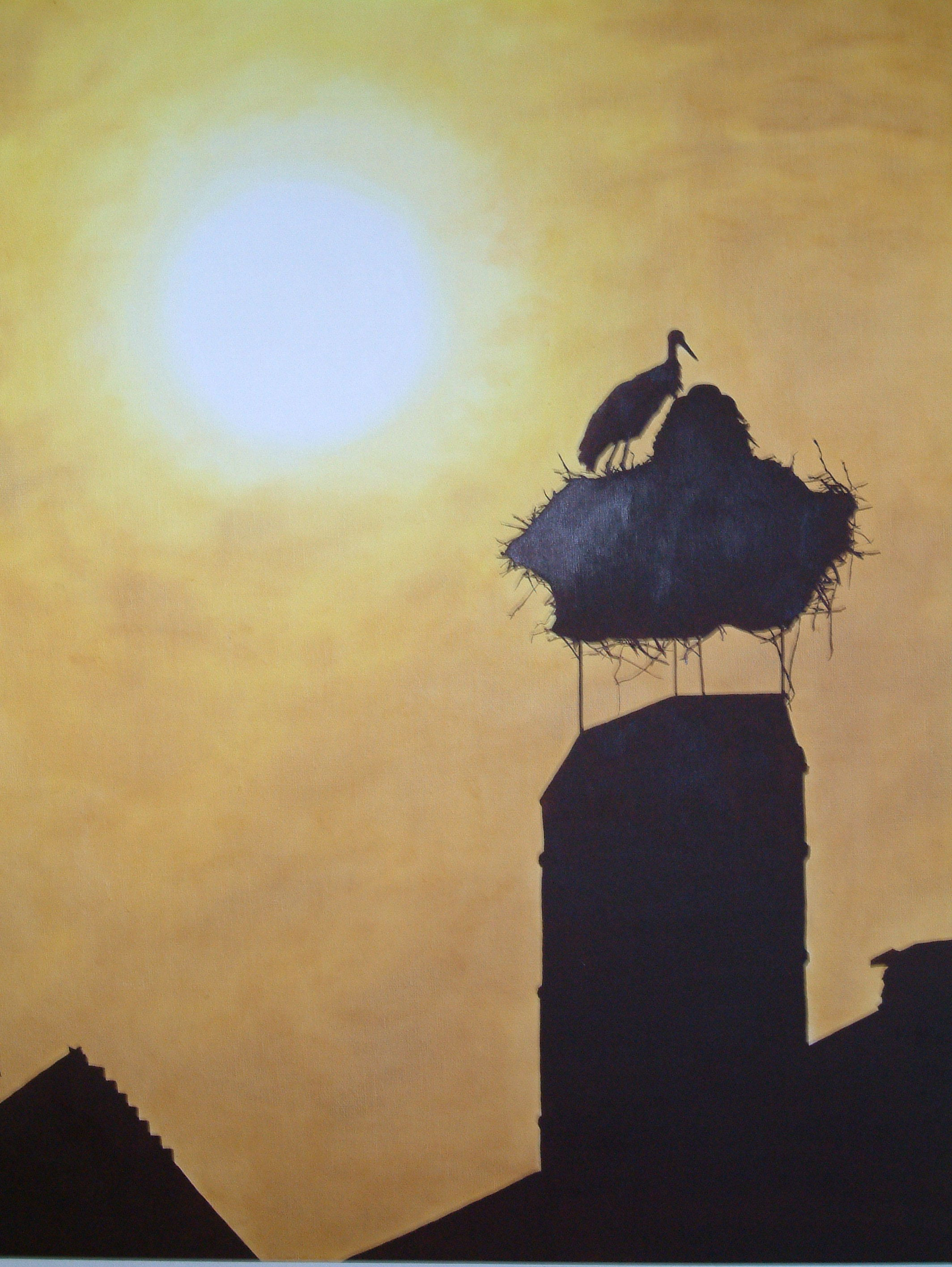 Storchengemälde „Zurückgekehrt“ (Öl auf Leinwand) von Jacklyn Gratzfeld aus der Ausstellung beim Bornheimer Storchenfest am 2. Juli 2006, selbst fotografiert am 2006-07-02 und als Foto unbeschränkt freigegeben durch Benutzer:Mundartpoet, als Gemäldeabbildung freigegeben durch Jacklyn Gratzfeld bei Nennung ihrer Urheberschaft